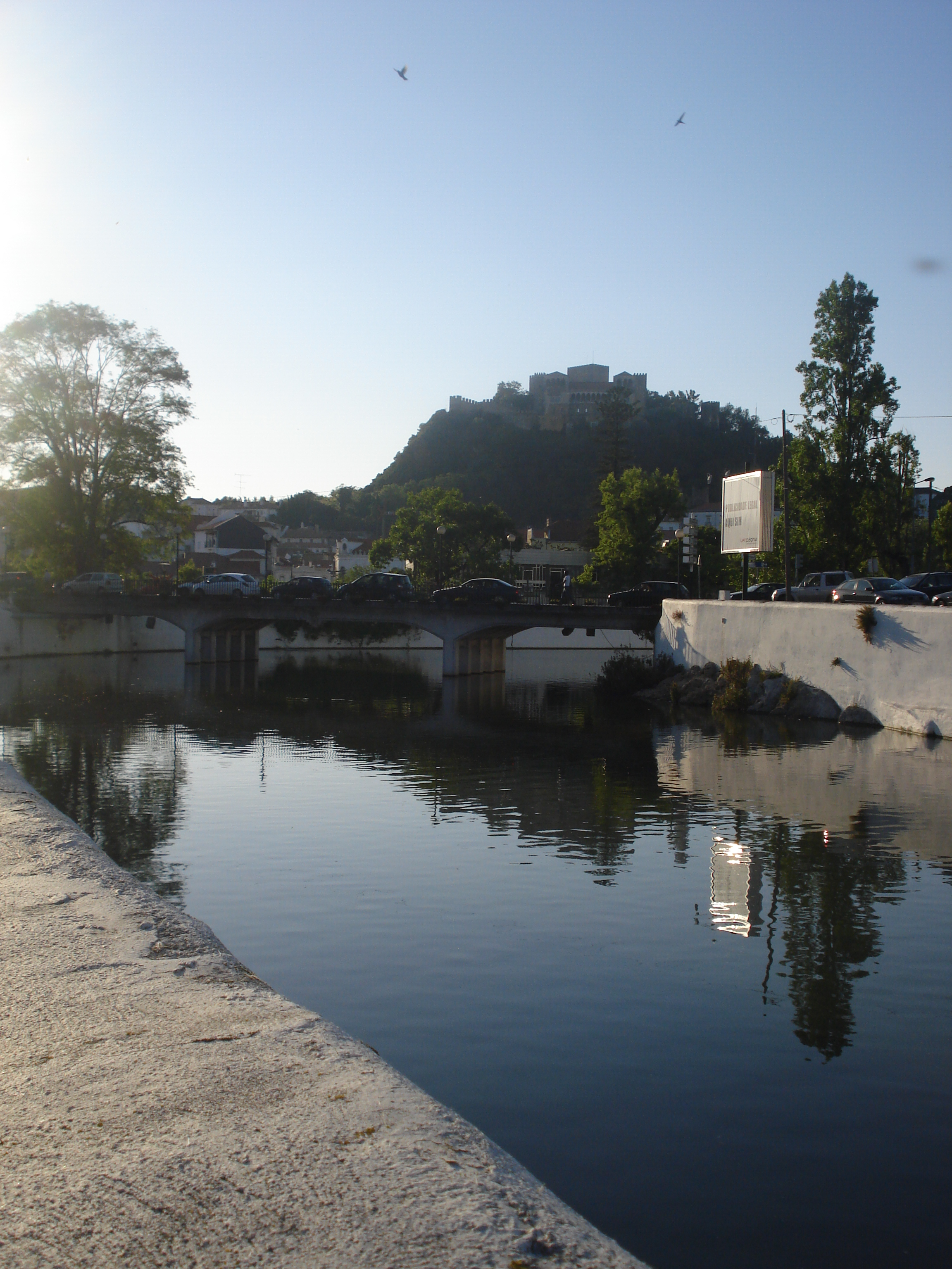 O rio Lis na cidade de Leiria, perto da Fonte Luminosa